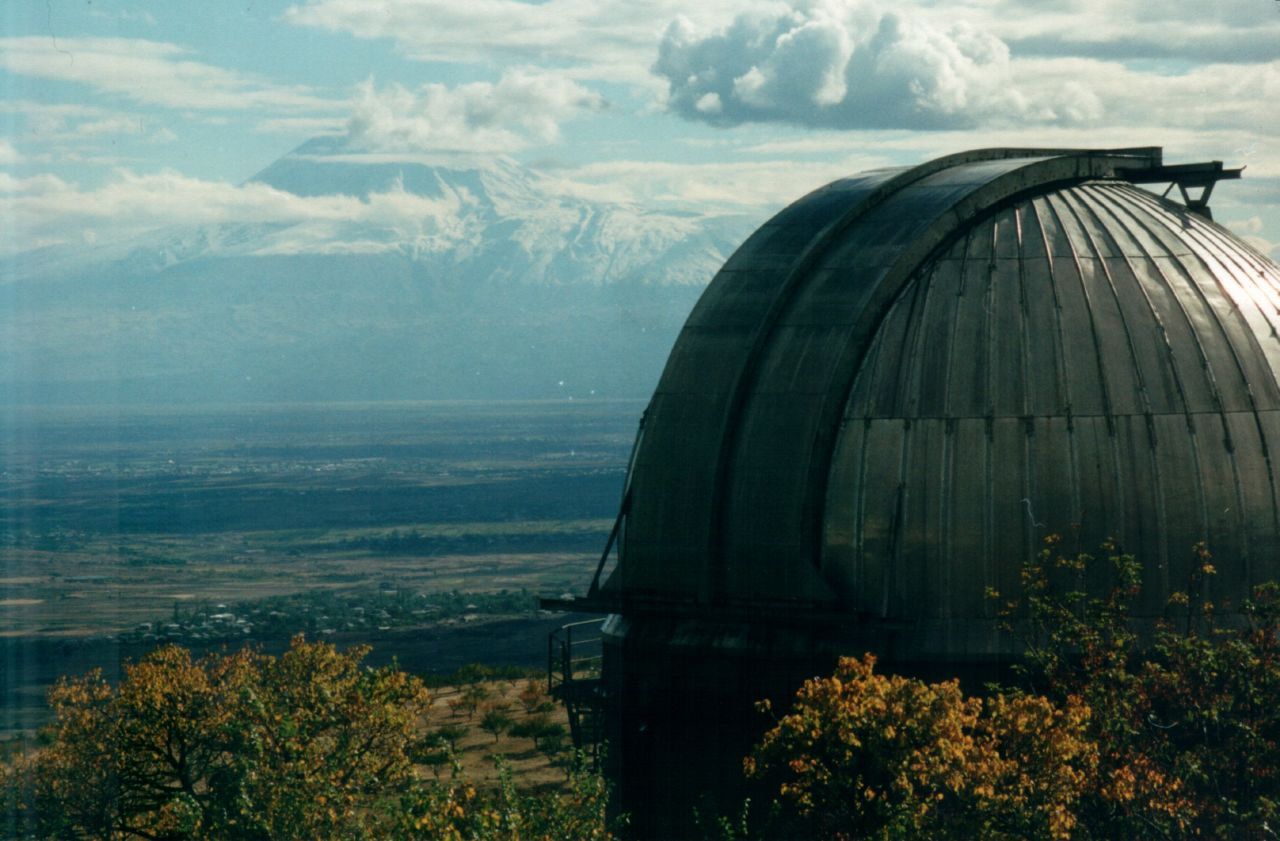 Byurakan Observatory